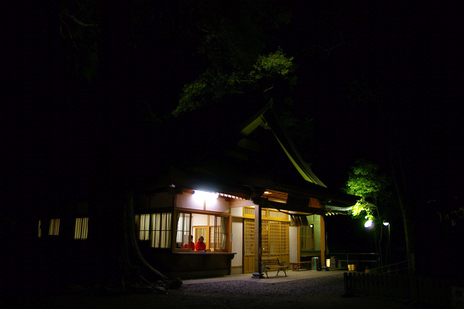 Vue du temple de Takachihojinja (高千穂神社) illuminé.